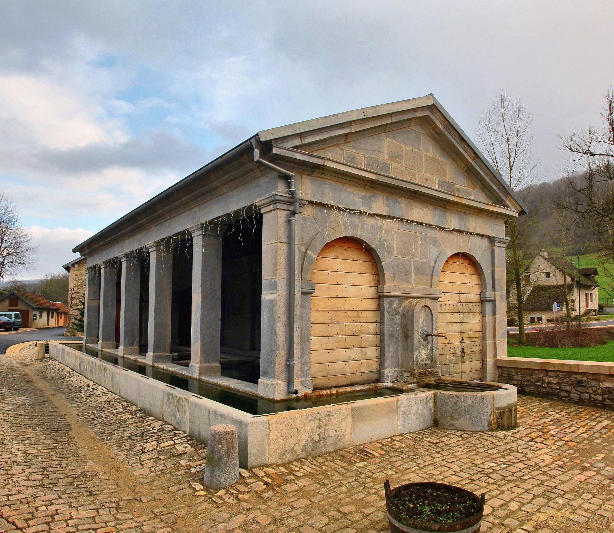 Inscrit aux monuments historiques sous le numéro : PA25000033